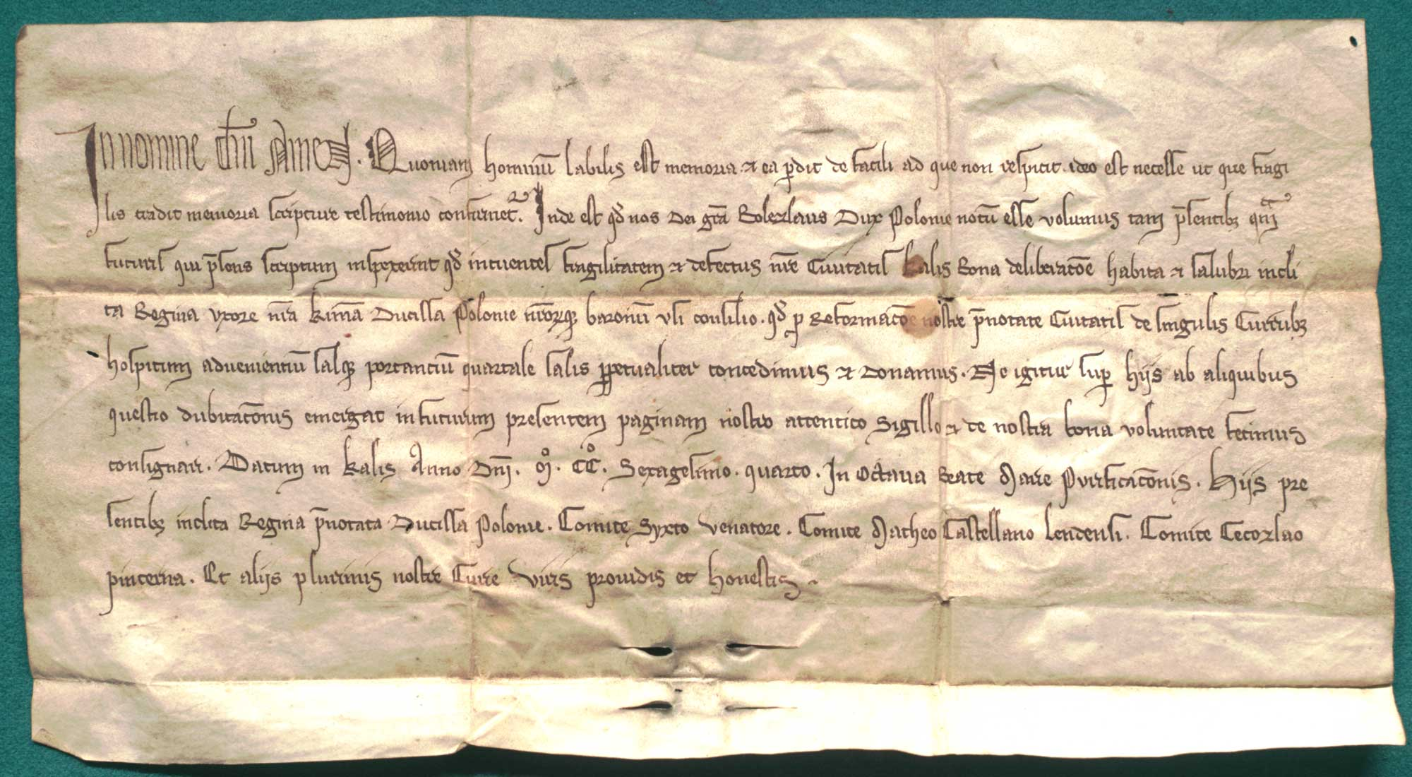 Bolesław, ks. polski, nadaje miastu Kalisz prawo poboru 1/4 soli od kupców tam przebywających. Język: łac. Opis zewnętrzny: oryg., 1 k. pergaminowa, 33,8 x 16,6 + 2,1 cm; 2 nacięcia po pieczęci Falsyfikat z przełomu XIII i XIV w.